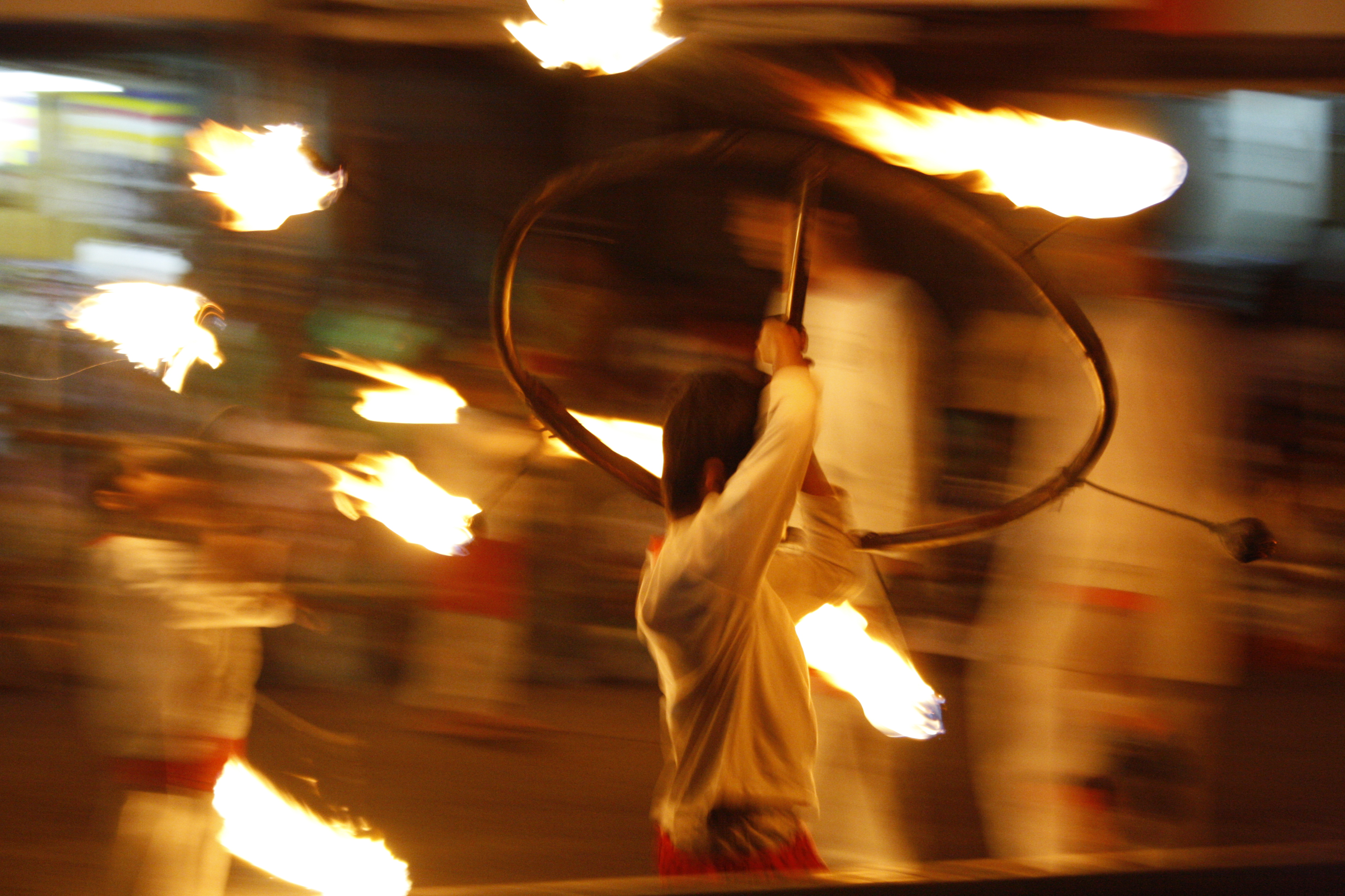 Artiste-jongleur maniant une large roue enflammée.